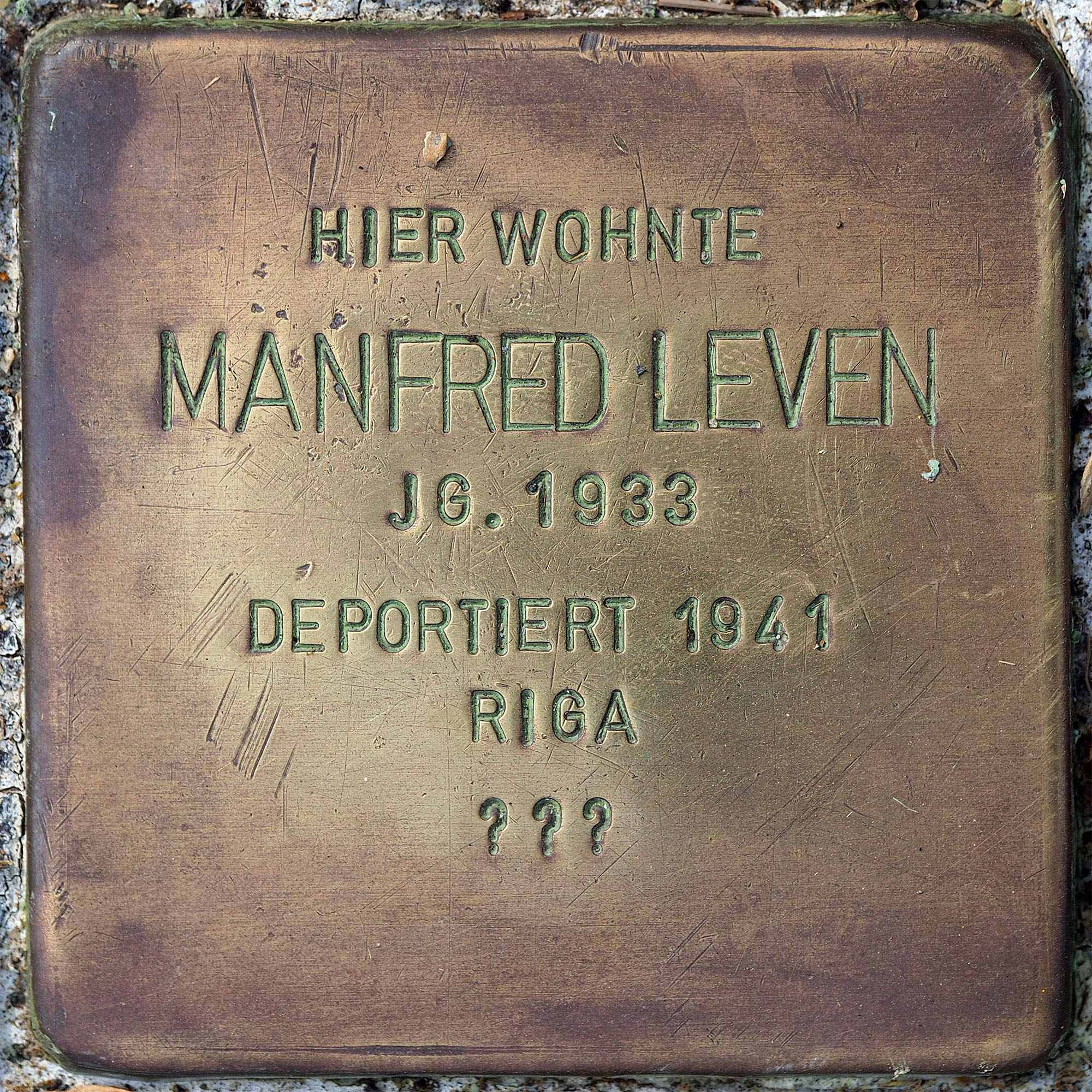 Stolpersteine MG: Leven, Manfred